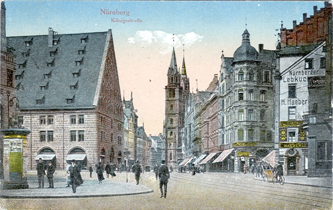 Postkarte, datiert 21.11.1919. Beschriftung: "Nürnberg - Königsstraße".